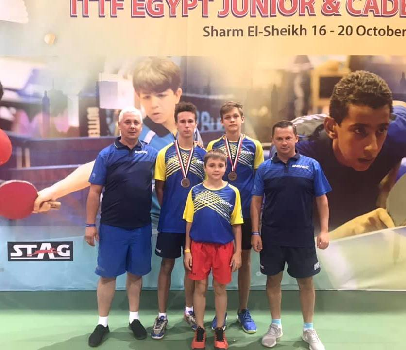 Назар Третяк